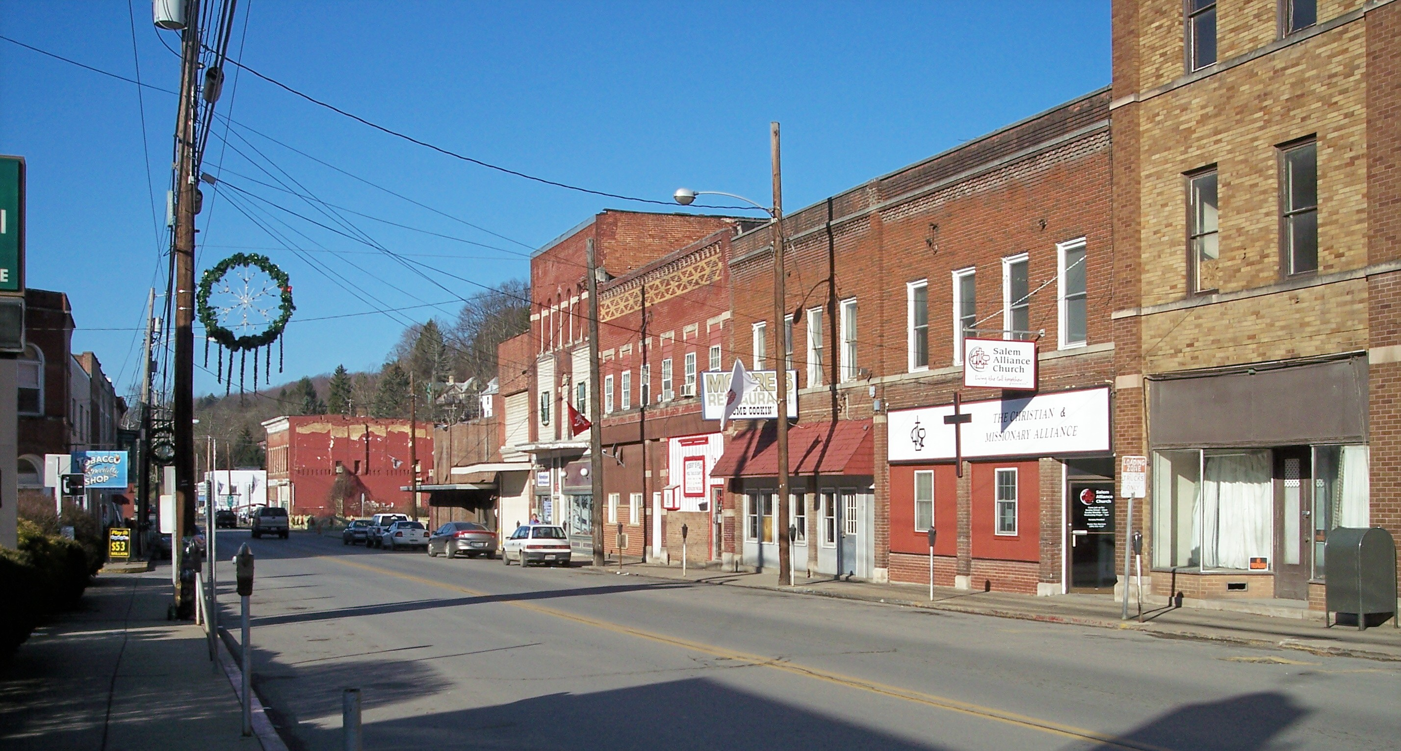 Main Street in Salem, West Virginia